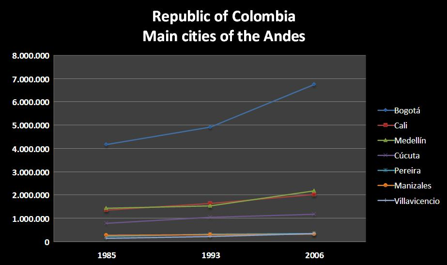 Ciudades colombianas de los Andes - Población